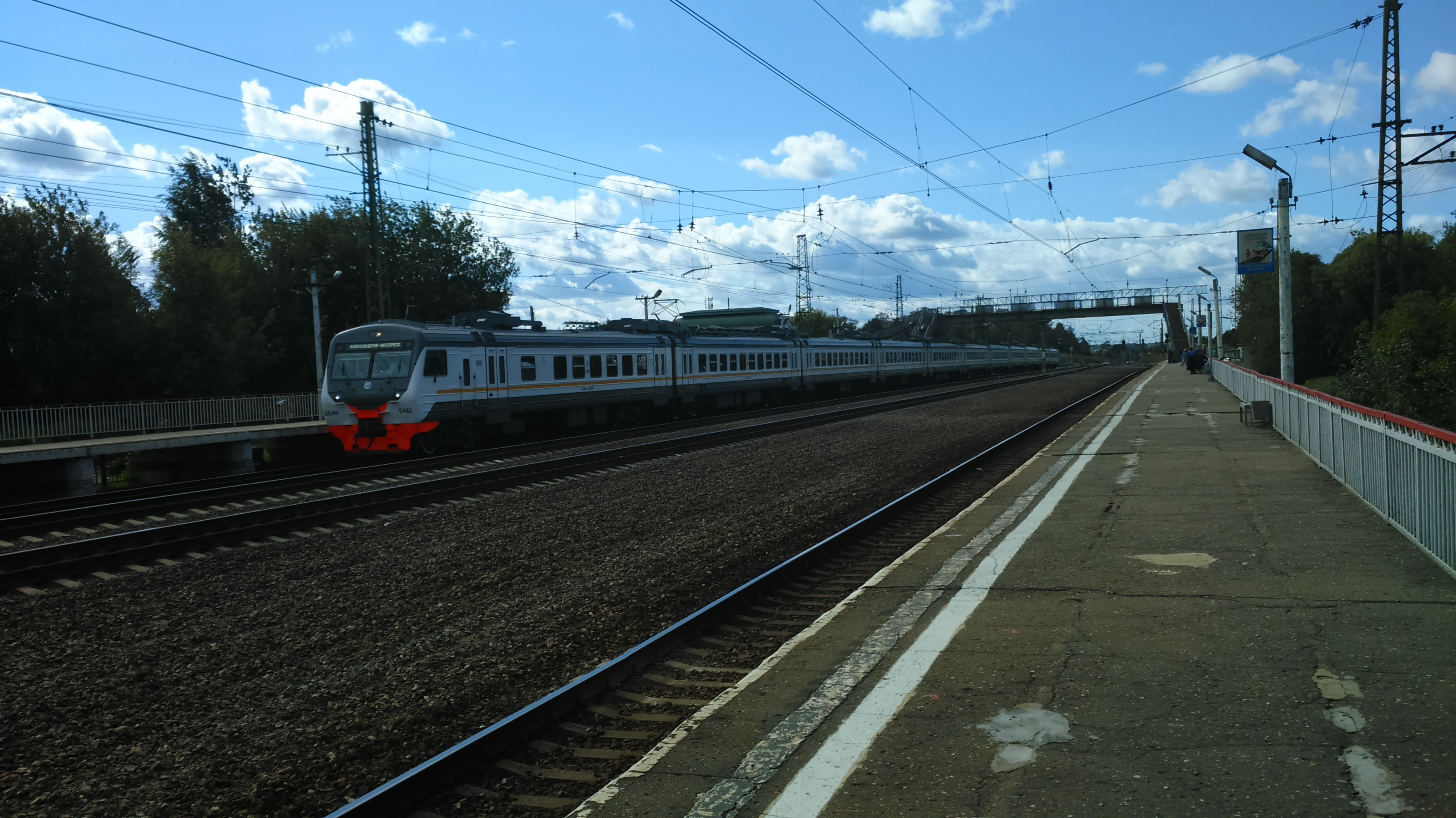 Электропоезд ЭД4М-0476 прибывает на станцию Струнино (МЖД)